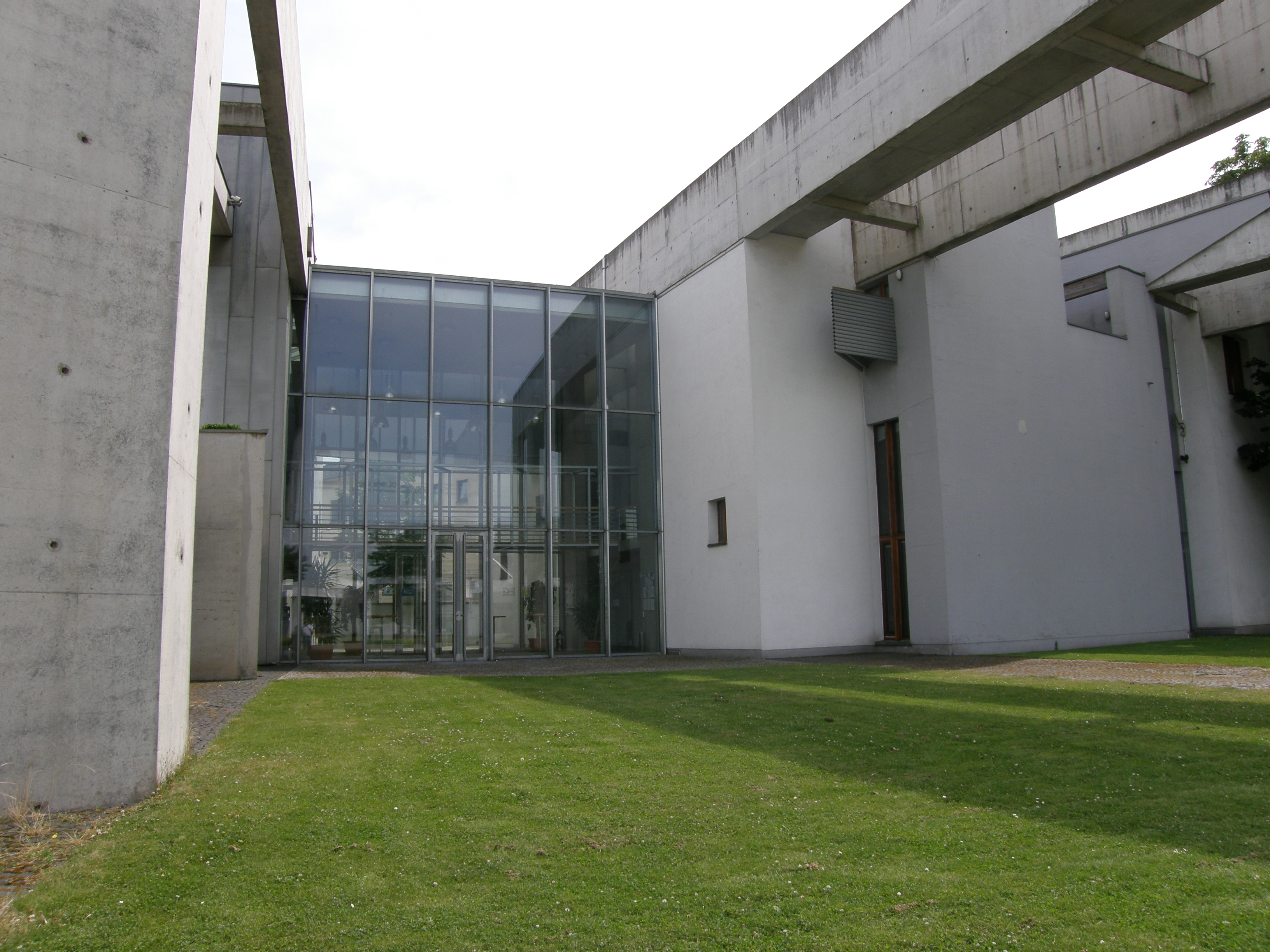 Atrium der Synagoge im Garten der Erinnerung im Innenhafen von Duisburg